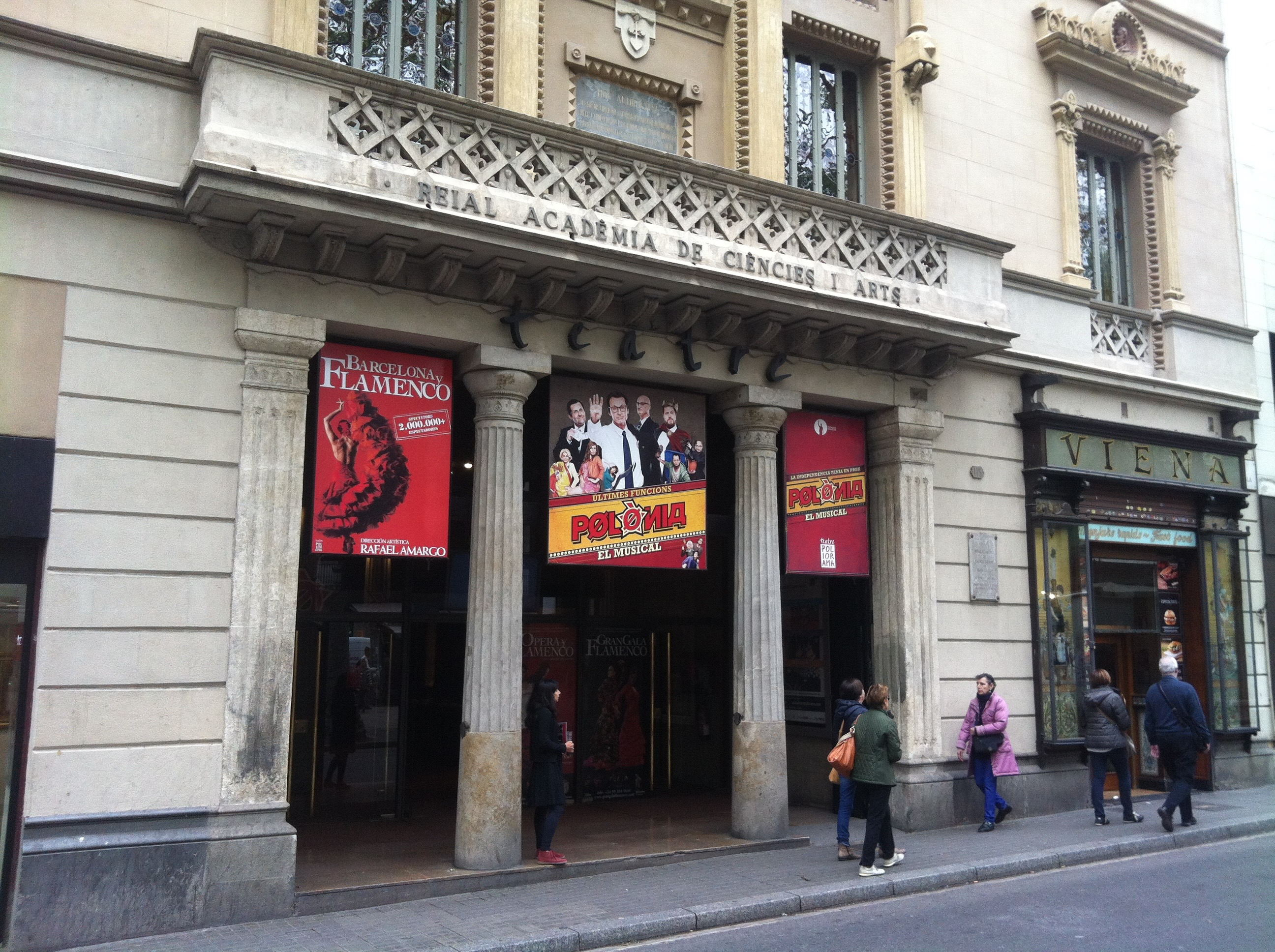 Polònia el Musical al Teatre Poliorama (Barcelona).